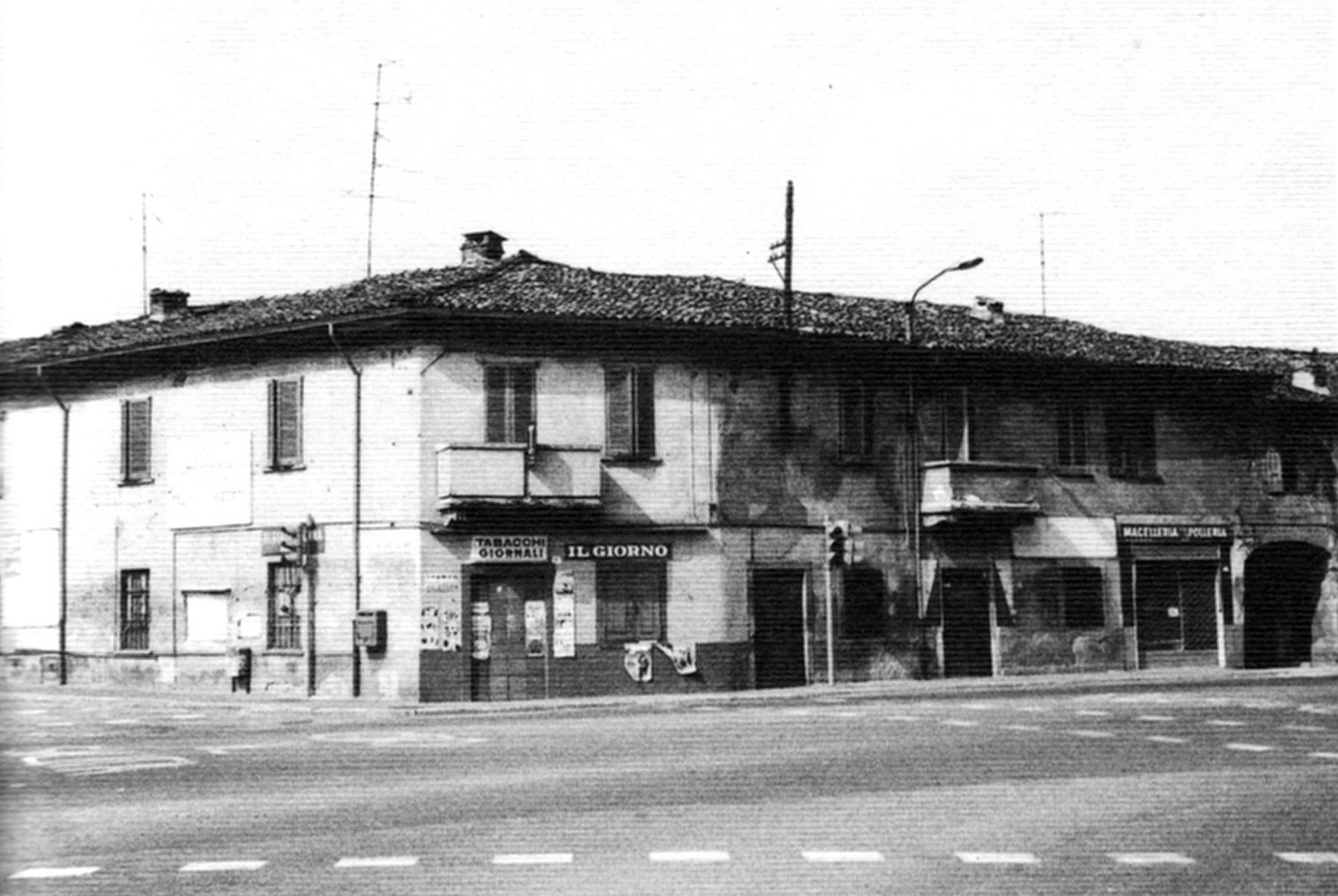 Foto d'epoca di un edificio della frazione Buon Gesù (comune di Olgiate Olona - VA - Italy) oggi demolito.